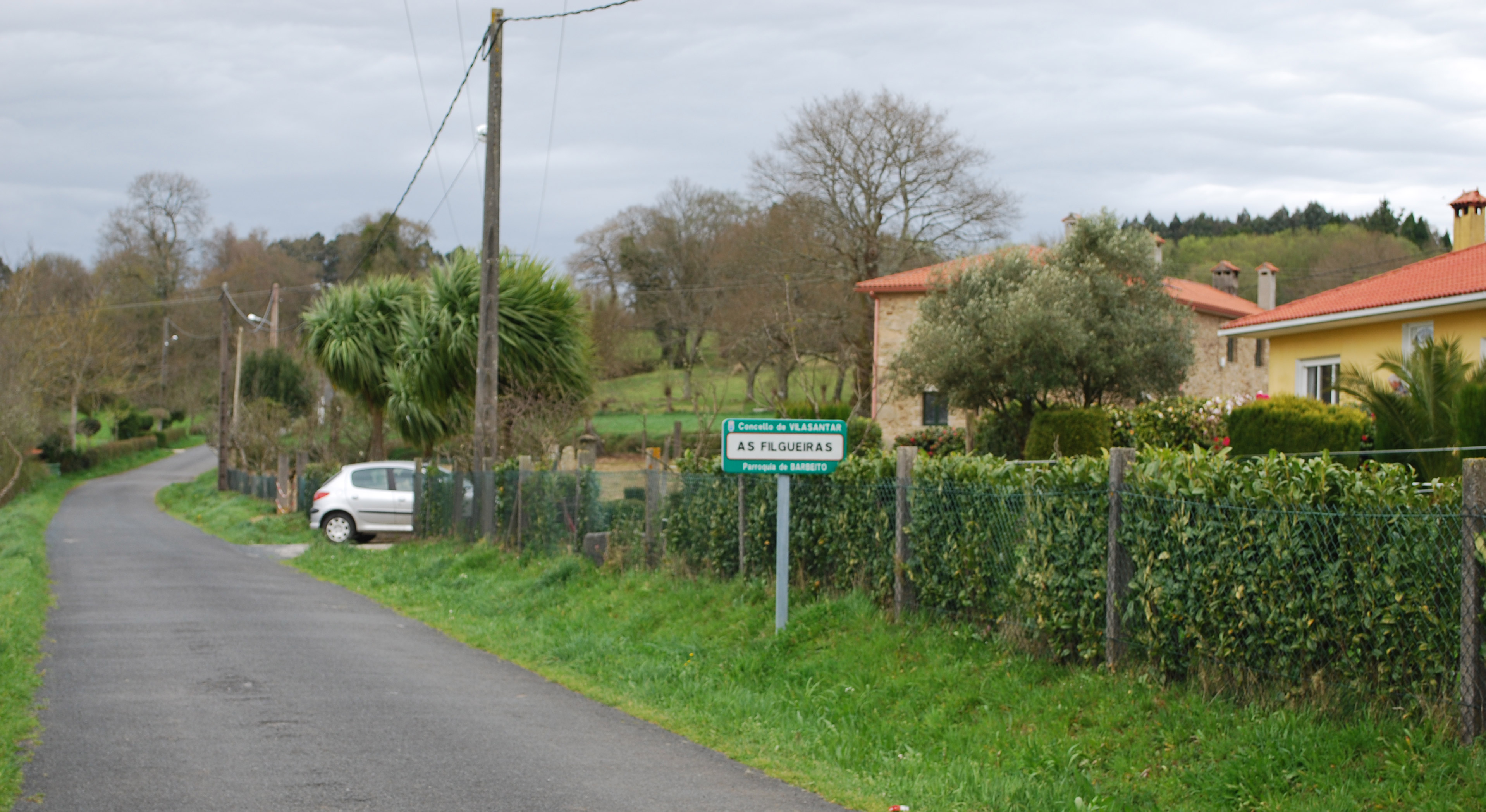 As Filgueiras en Barbeito Vilasantar A Coruña Galiza Spain